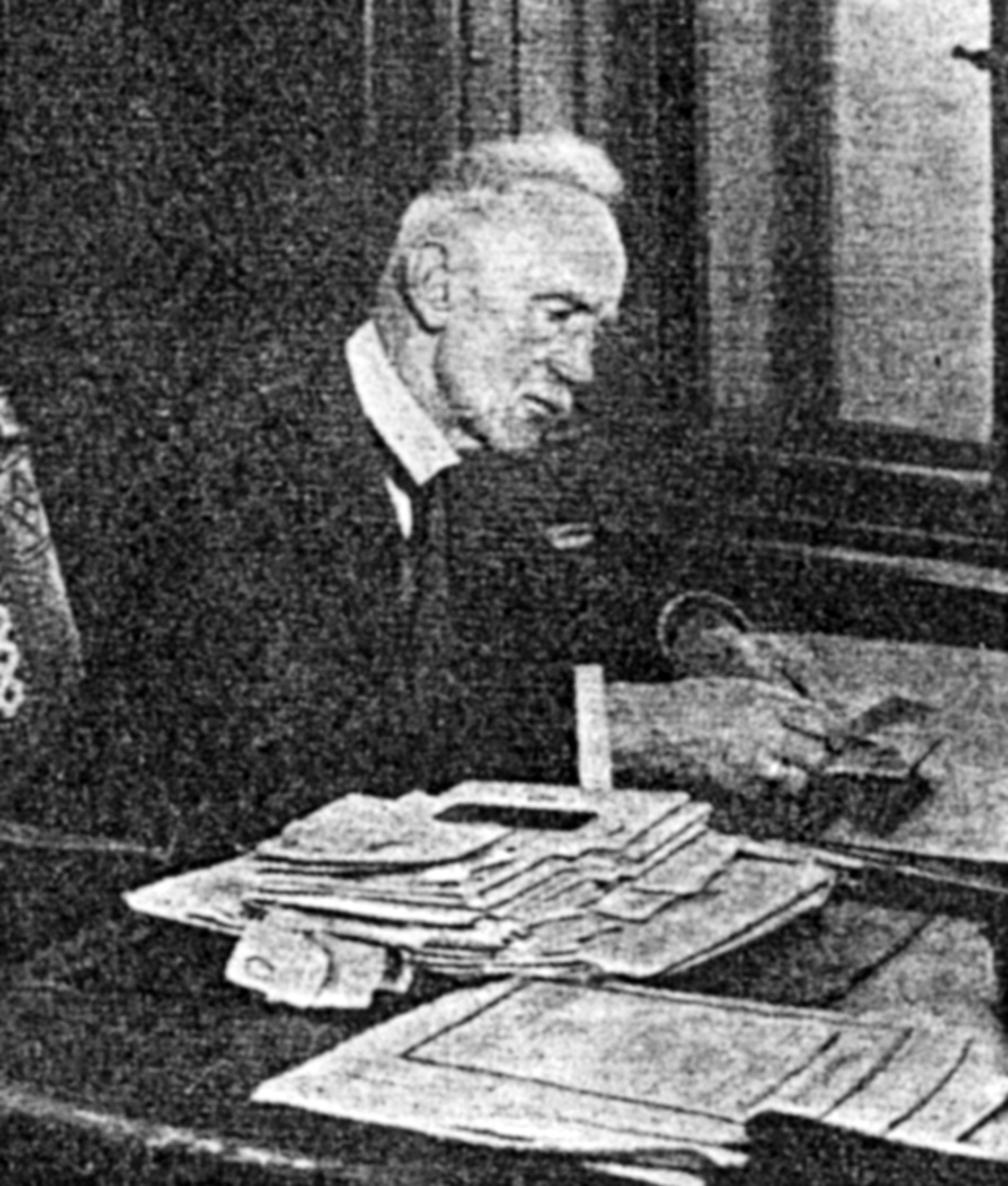 Kommerzialrat Wilhelm Stiepel modernisierte den Betrieb unablässig.